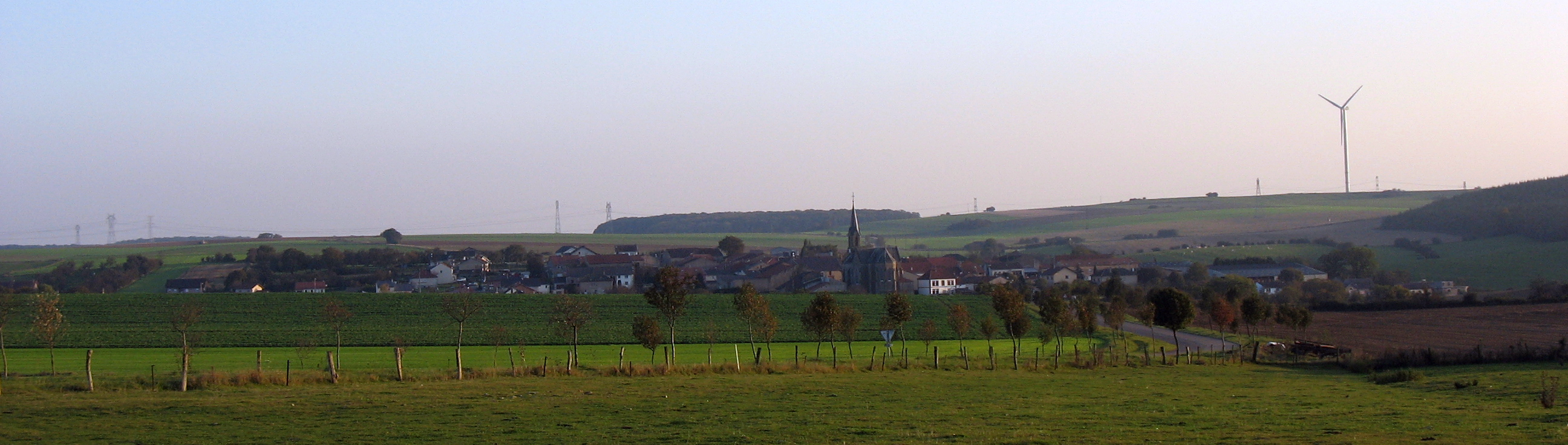 C'est une vue de Momerstroff. On voit une partie du plateau éolien de Momerstroff : il y a encore 4 éolienne plus à droite.